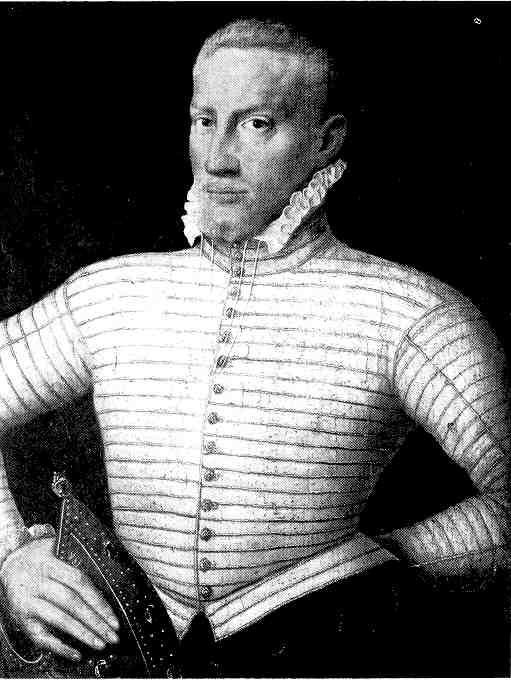 Portrait of Gebhard Truchsess von Waldburg (1547-1601)